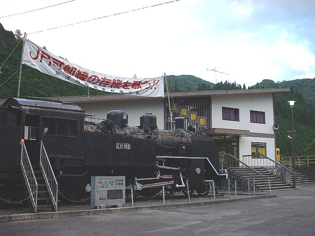 可部線三段峡駅舎 左はC11-189